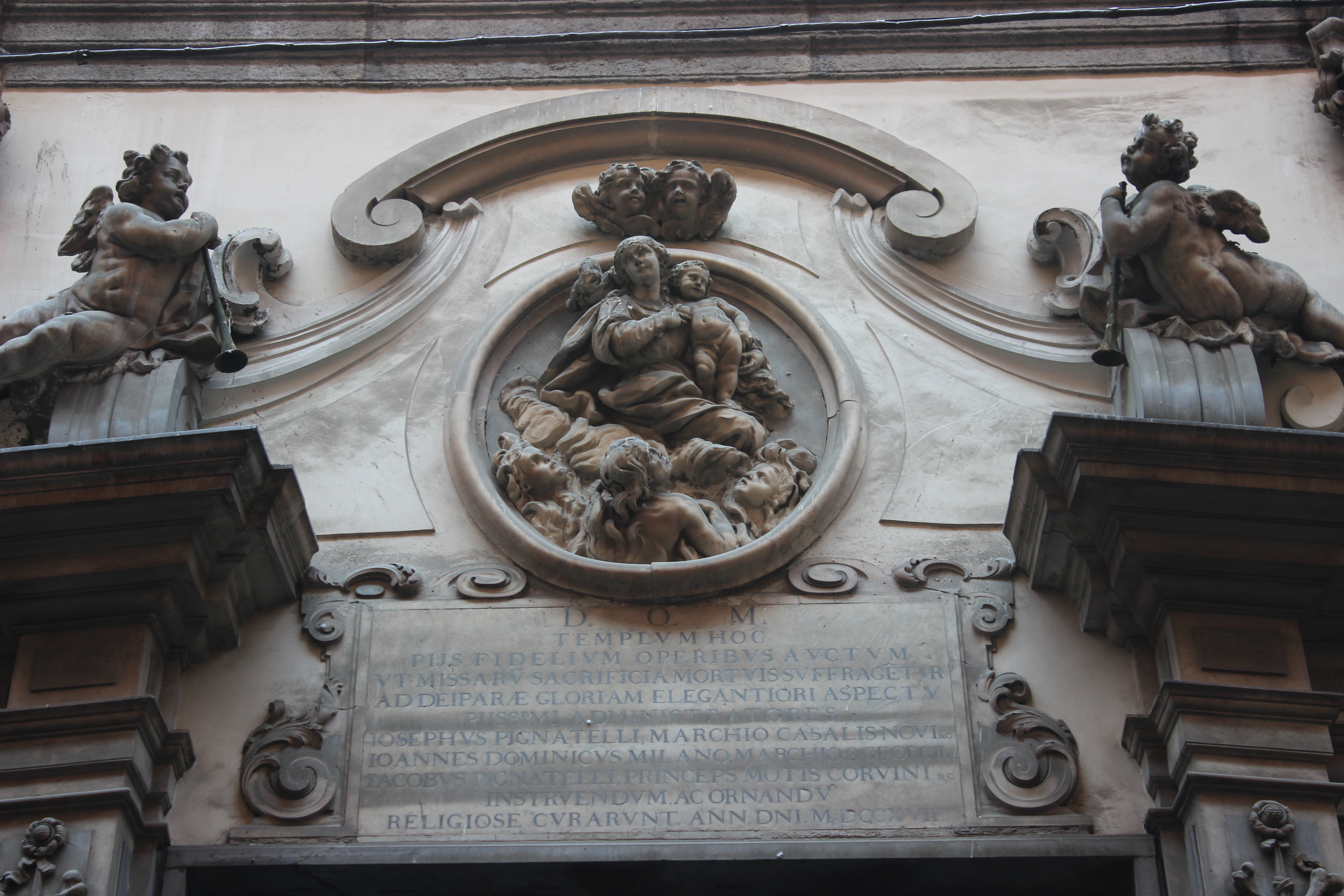 Nápoles. Purgatorio ad Arco. Fachada